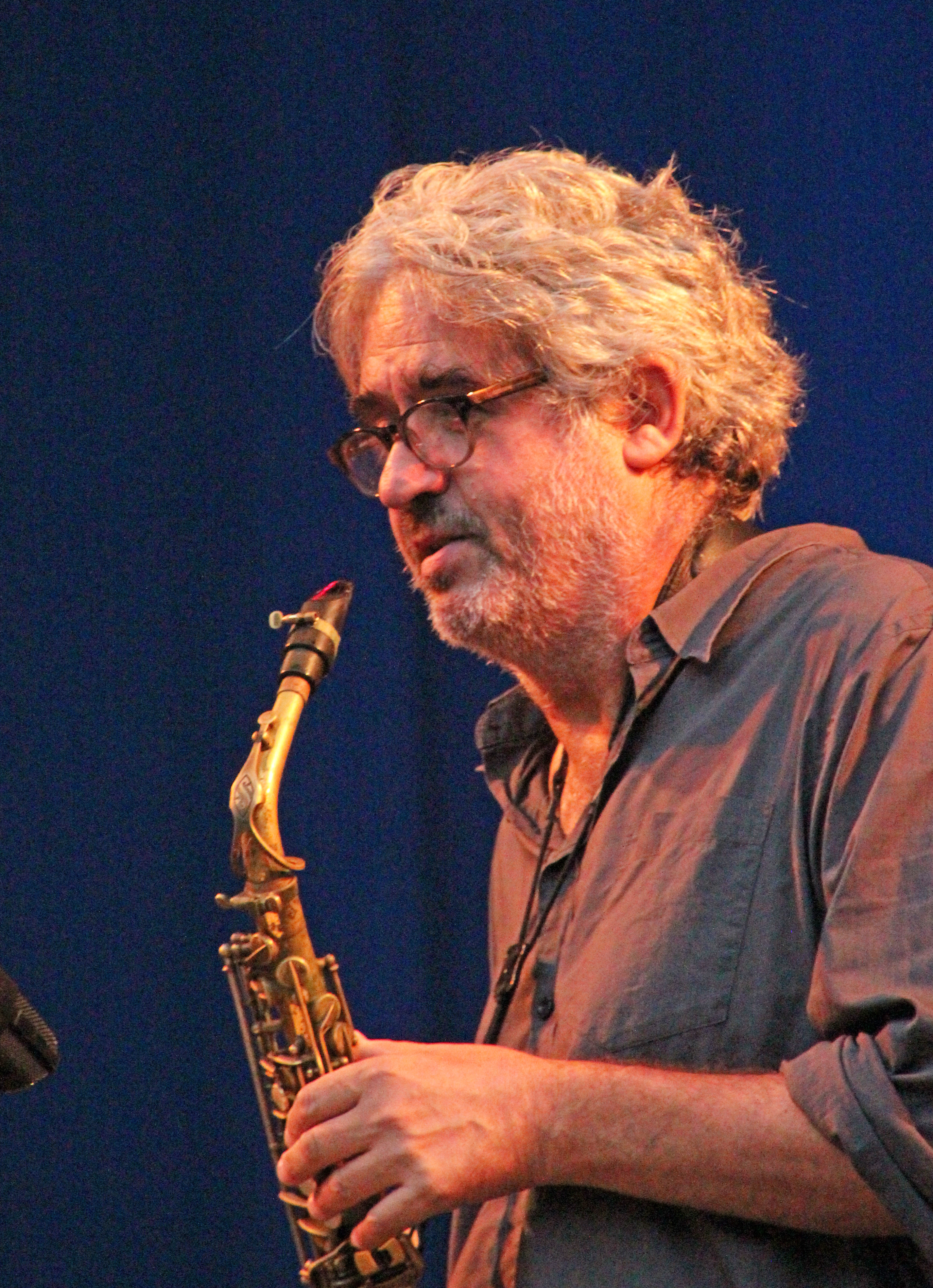 Bildinhalt: Tim Berne bei einem Auftritt im Frankfurter Palmengarten Aufnahmeort: Frankfurt am Main, Deutschland Die dargestellte Person wurde bei einem öffentlichen Auftritt fotografiert.